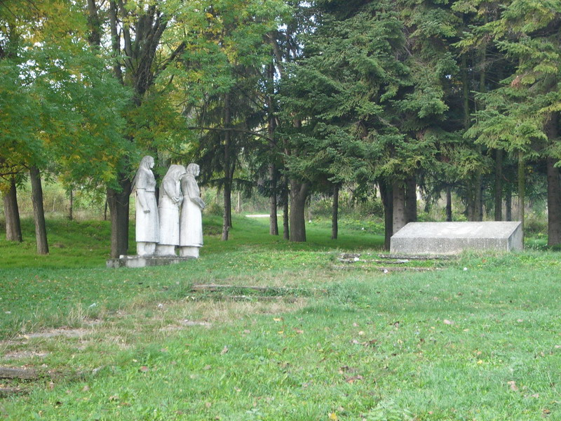 Село Зараево, община Попово. Паметникът на загиналите жители от селото във въстананието през 1923 година